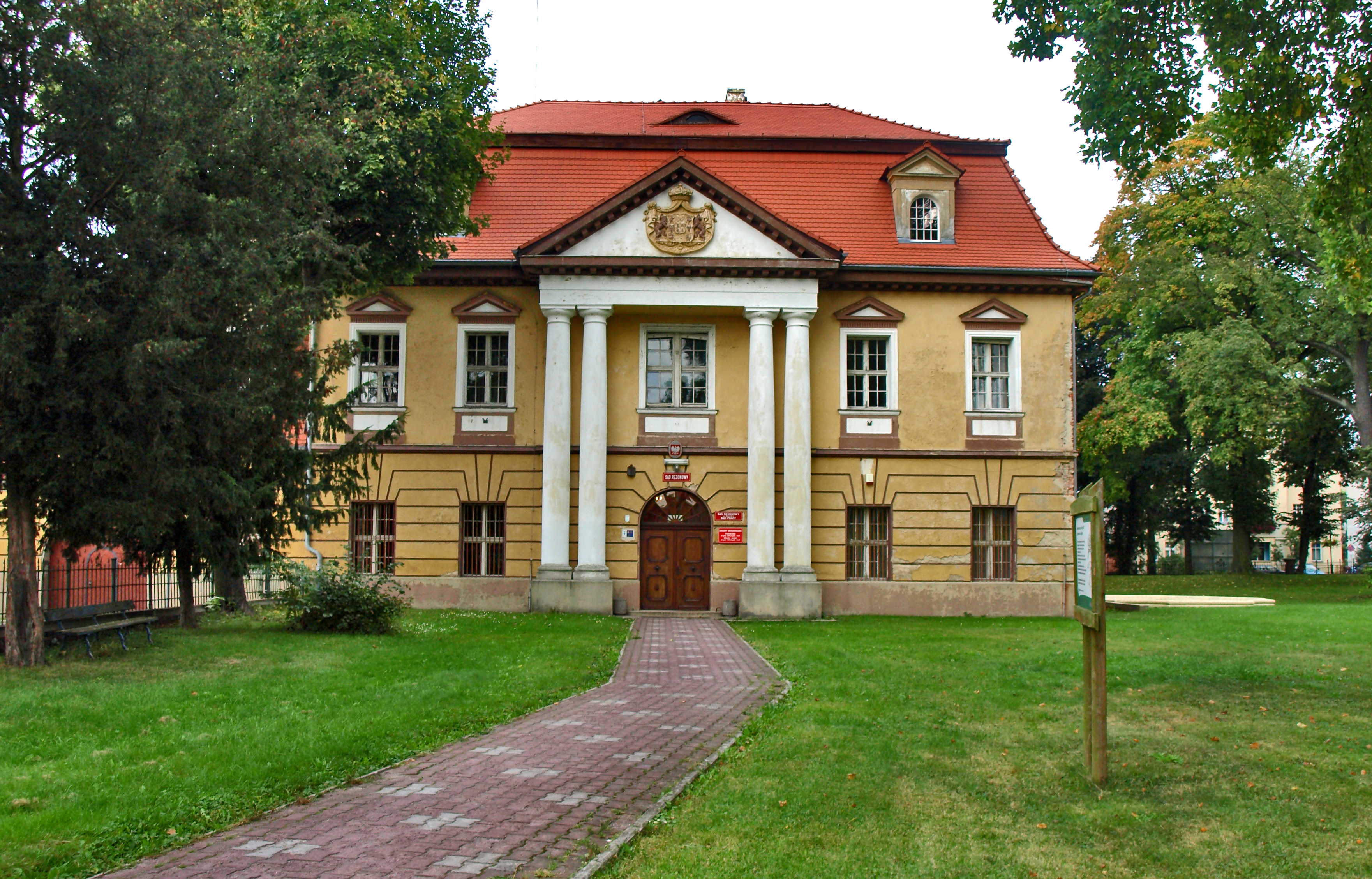 Pałac kamery książęcej, ob. sąd rejonowy, ul. Szprotawska 3, Żagań